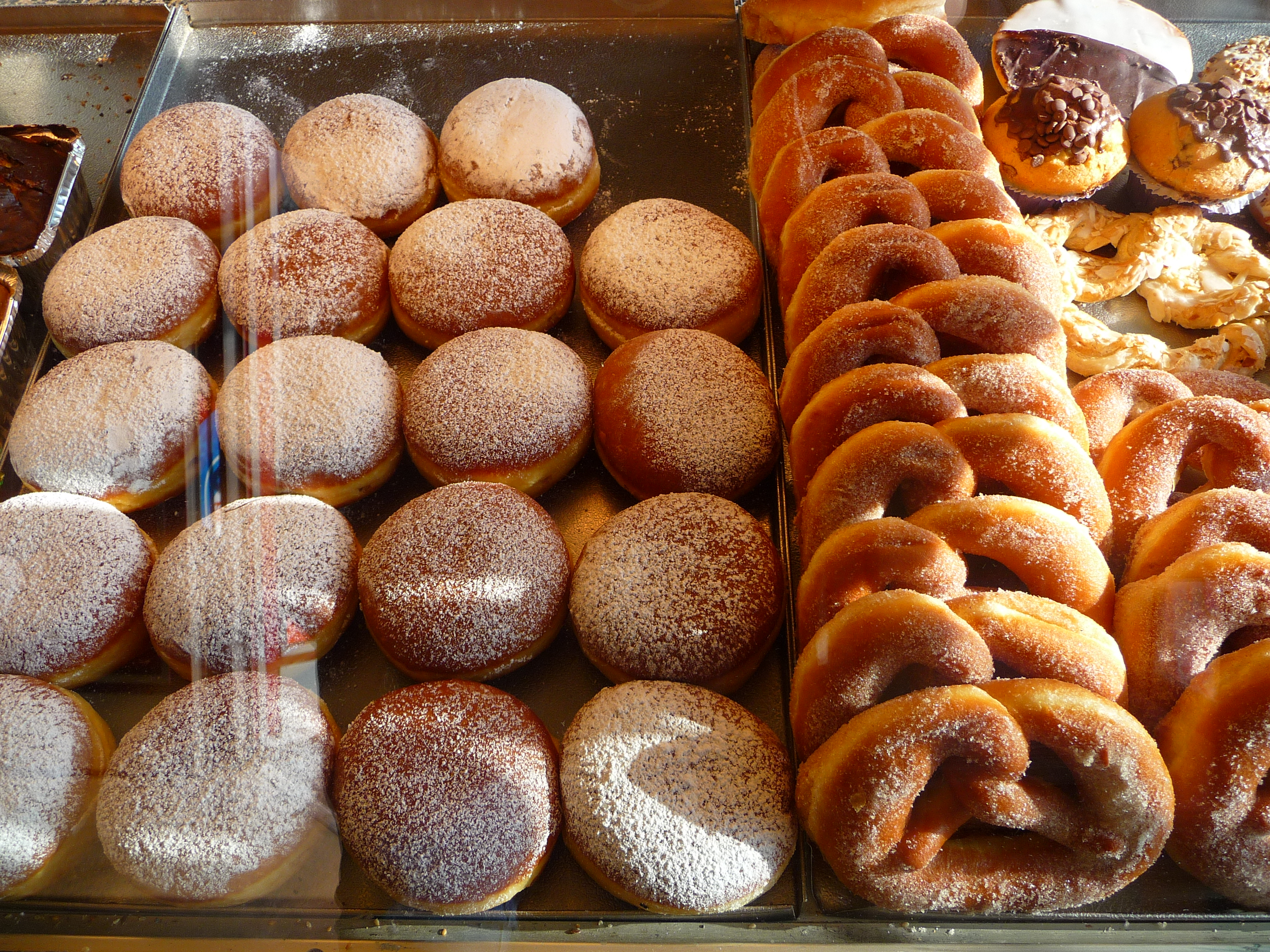 Auslage in einer Bäckerei: von links nach rechts - Berliner mit Marmeladenfüllung, rechts unten Faschingsbrezeln aus dem gleichen Teig und ebenfalls in Fett ausgebacken, rechts oben ein "Amerikaner" und zwei Muffins mit Schokoladenstückchen sowie eine Blätterteigbrezel